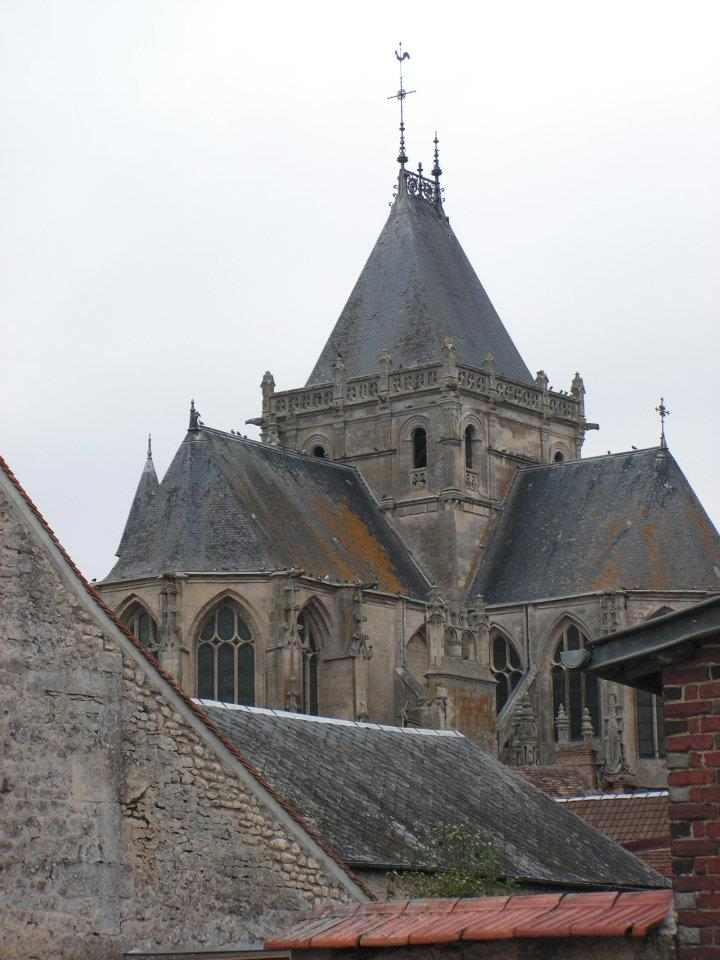 Eglise Notre-Dame (XVième et XVIième), Ecouché, Orne